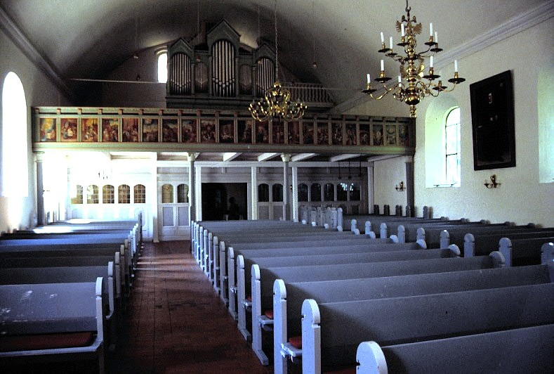 Niebüll Kristkirke i Sydslesvig. Skibet set mod vest